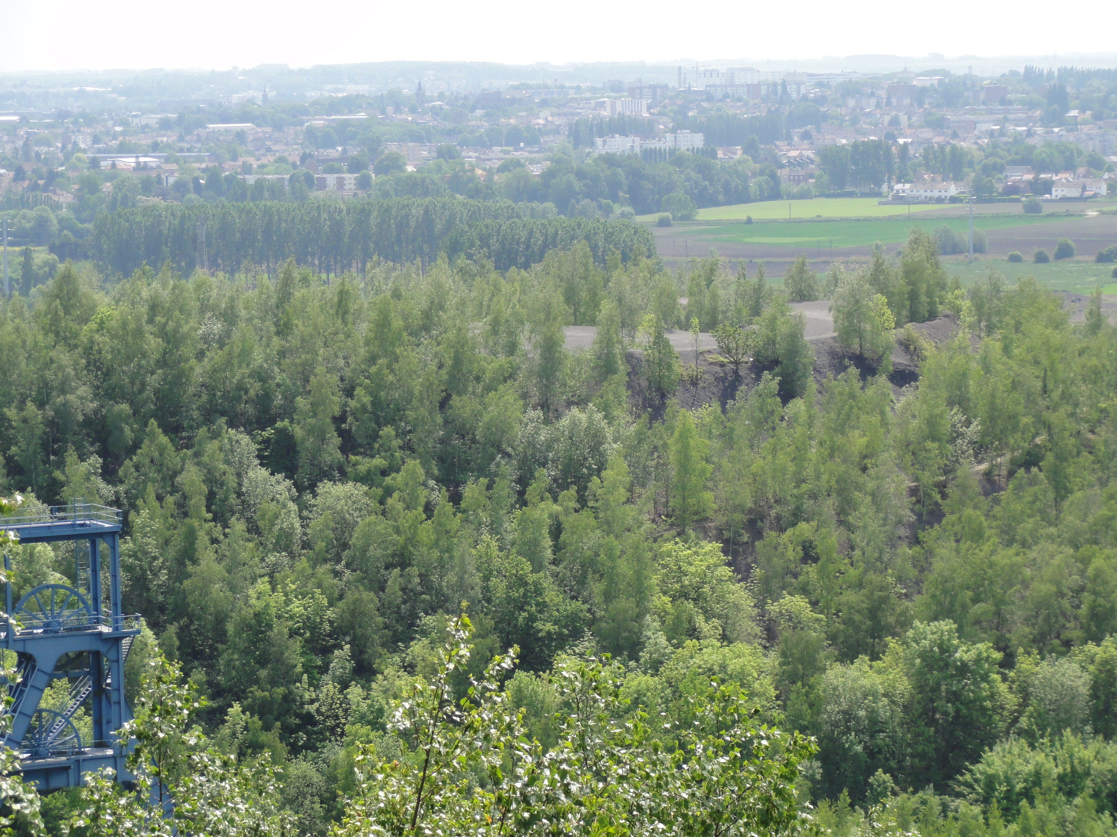 Terril n° 174 dit Sabatier Sud, Fosse Sabatier de la Compagnie des mines d'Anzin, Raismes, Nord, Nord-Pas-de-Calais, France.